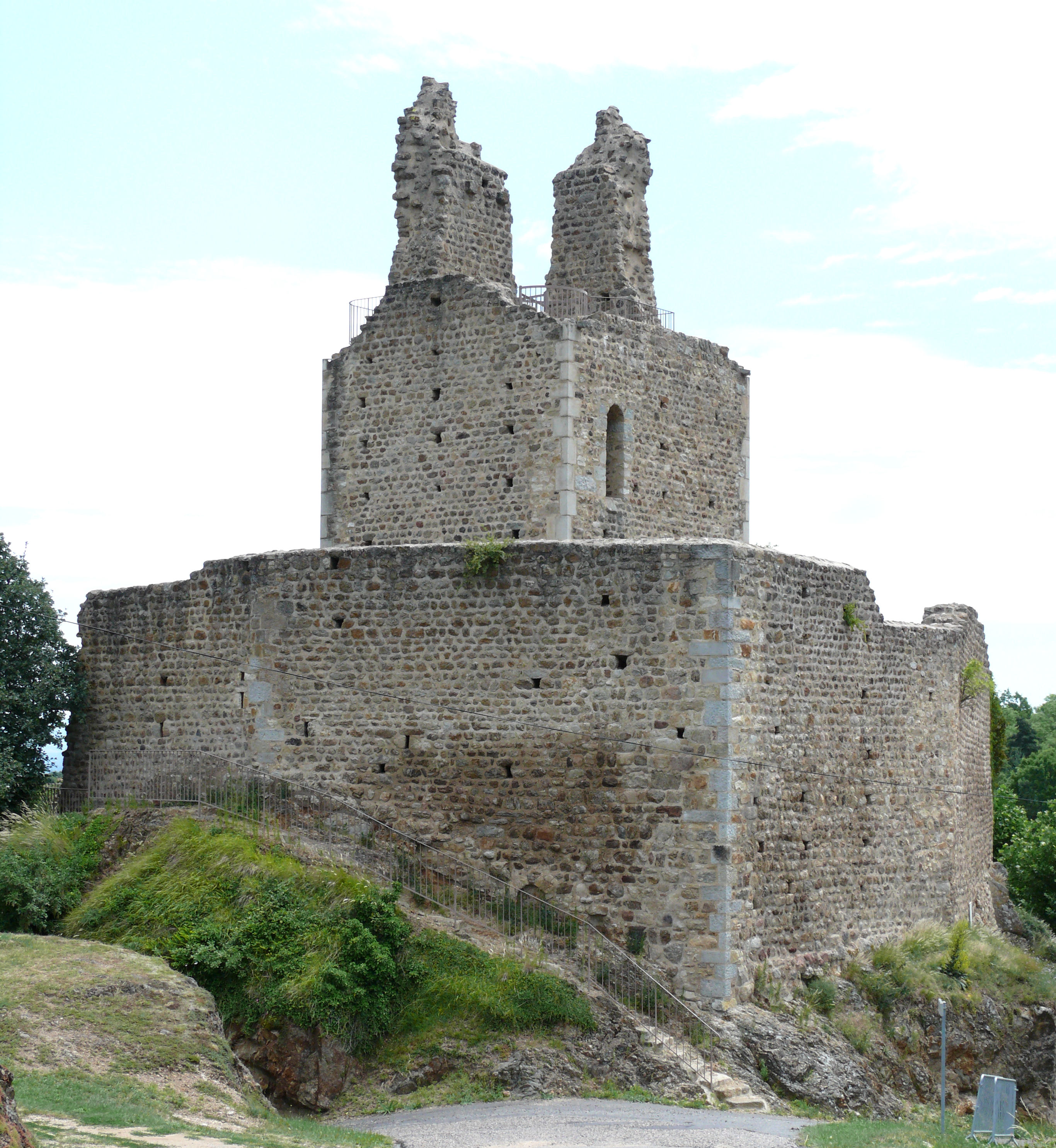 Vieil Ecotay - Donjon